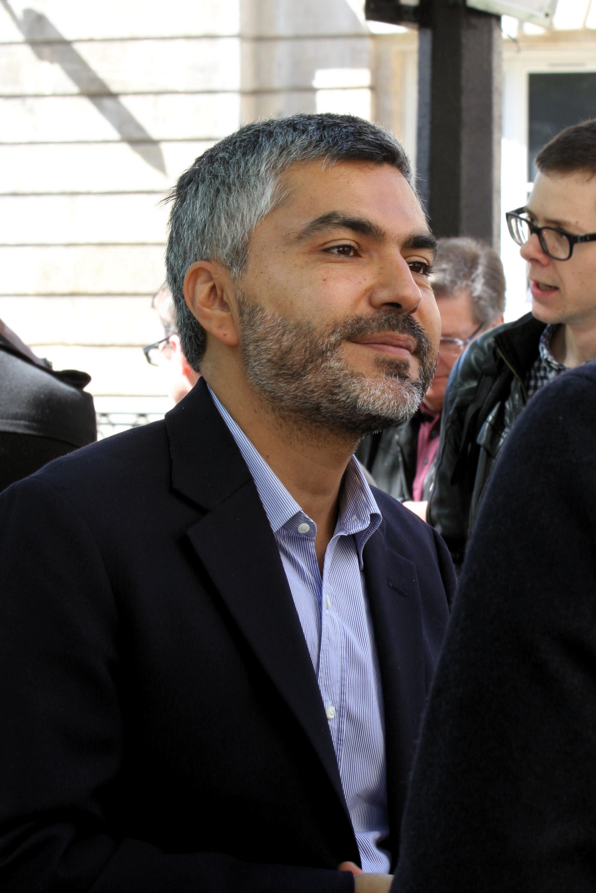 Sergio Coronado - Manifestation contre le projet de loi Renseignement - 13 avril 2015